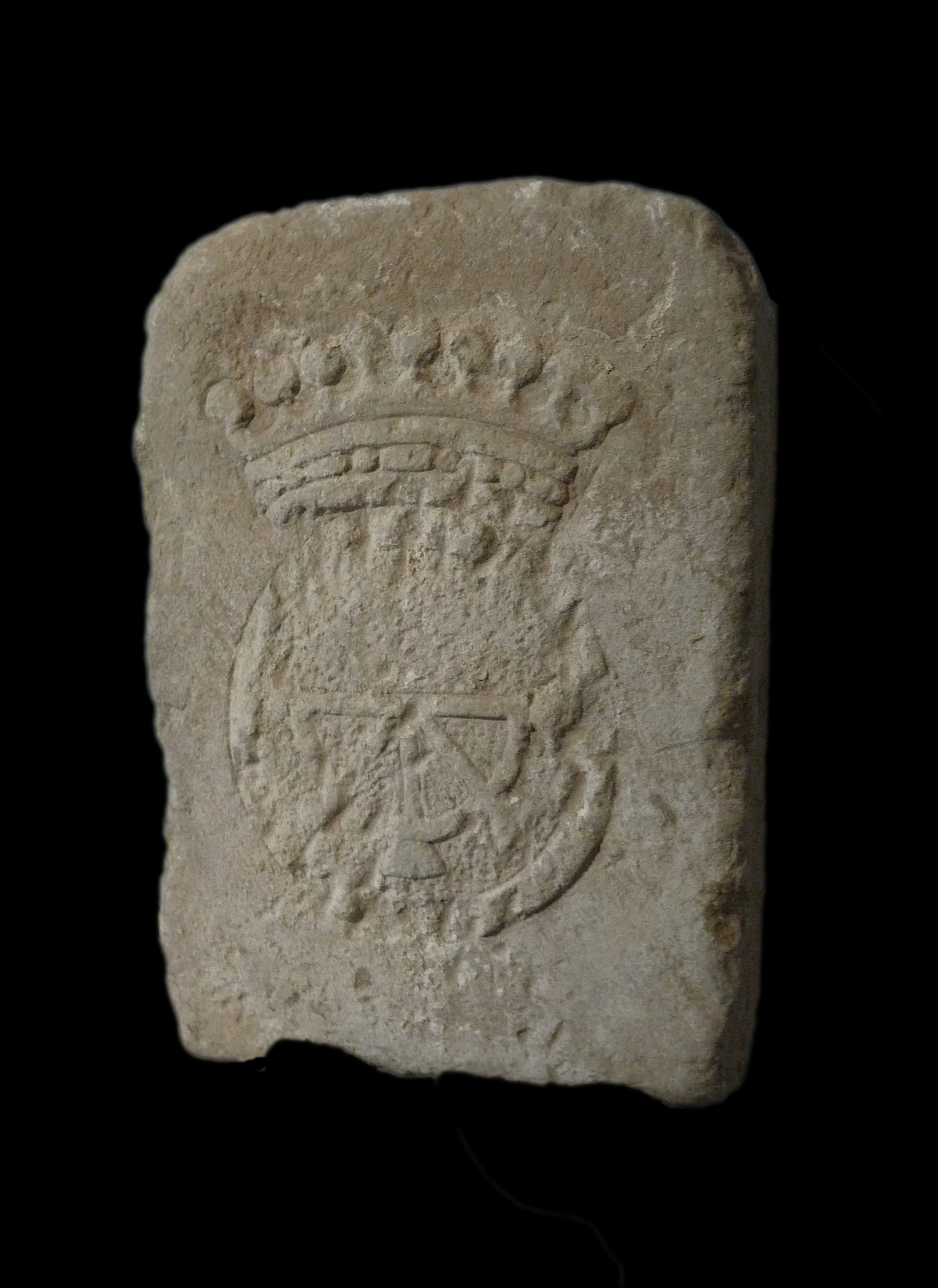 Borne limite du ban d'Avolsheim (la ferme du Finkenhof et le vignoble des moines chartreux se situaient sur le ban d'Avolsheim). Chartreuse de Molsheim (Bas-Rhin)